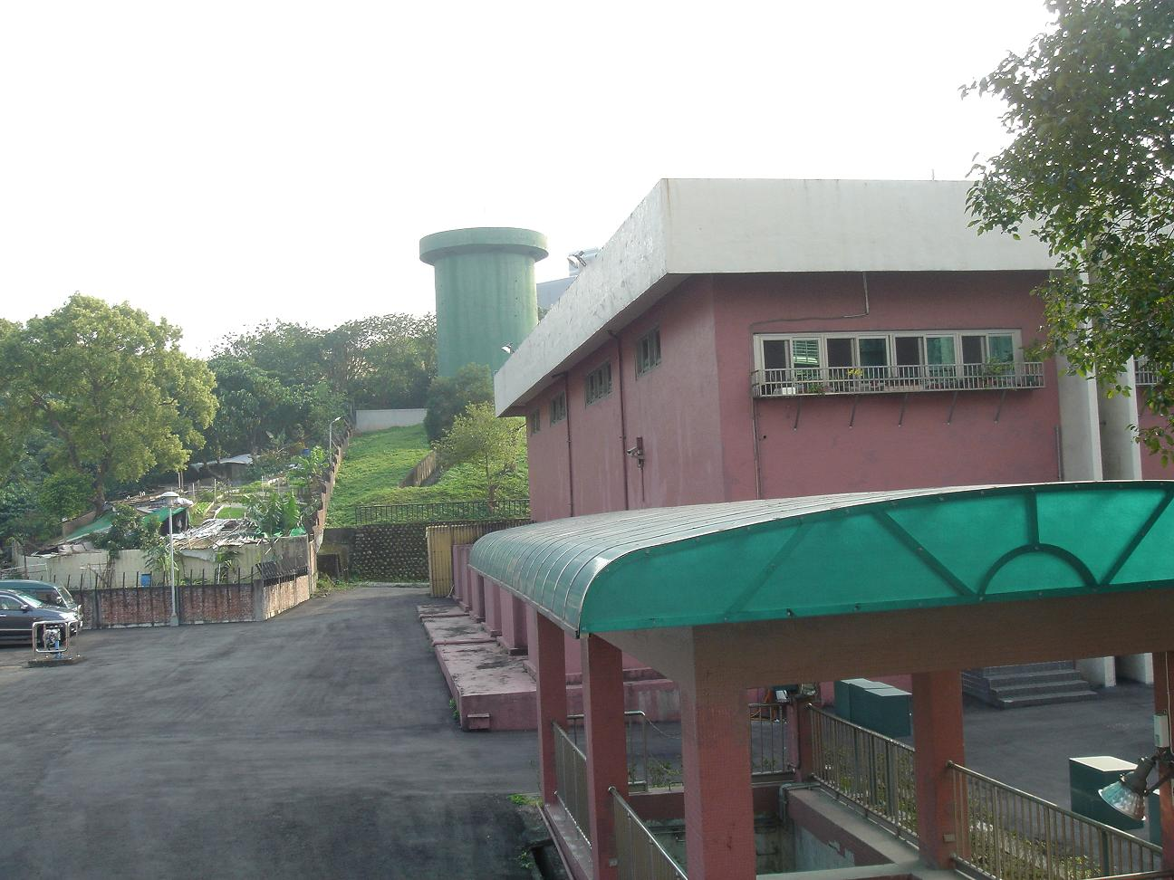 中文（台灣）: 台北自來水事業處中和加壓站（台北縣中和市）。